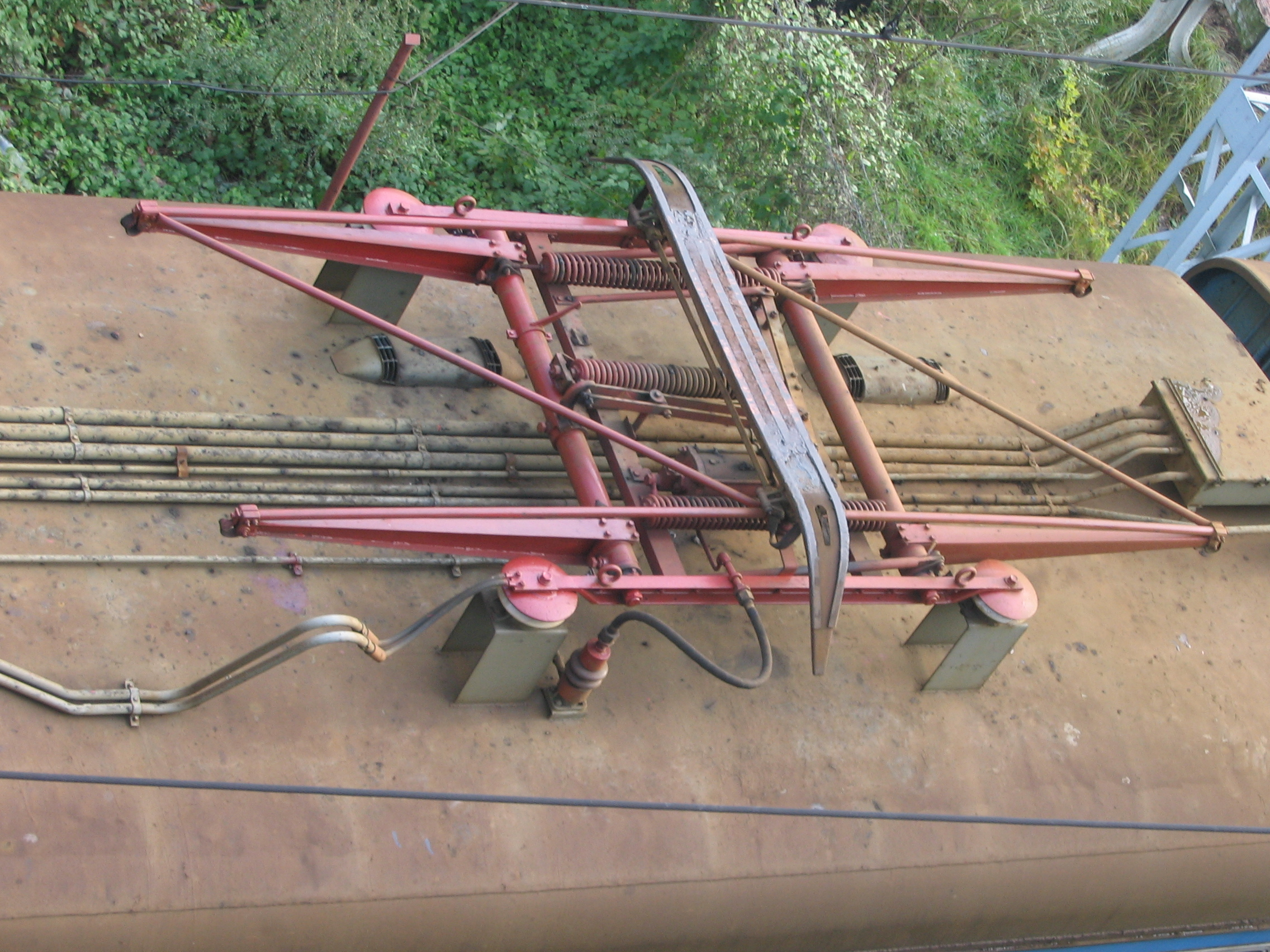 Odbierak prądu w zespole trakcyjnym EN57 w stanie złożonym, widok z góry. Wjazd na stację Poznań Główny